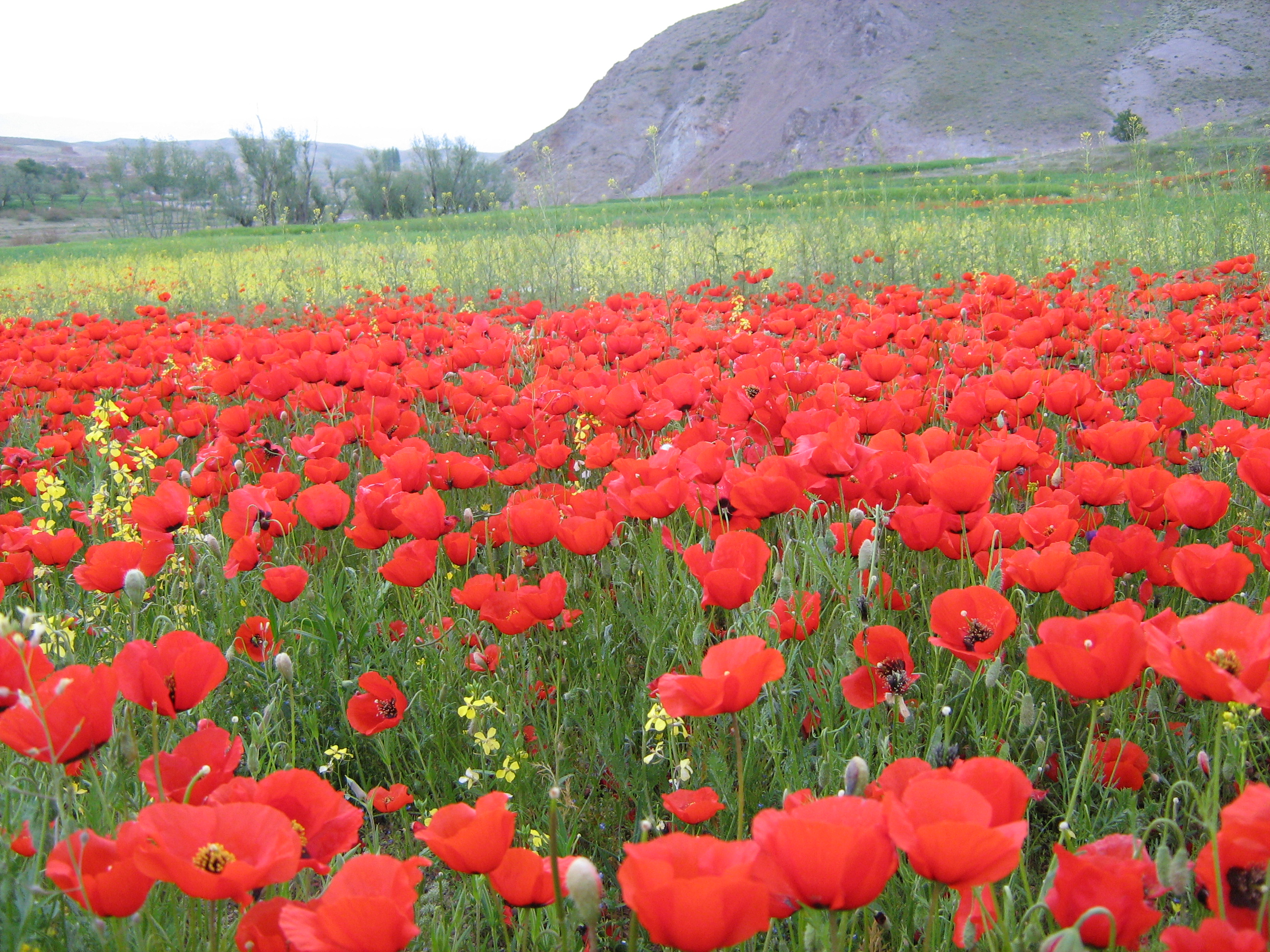 تصاویری از گل های لاله در مزارع قوزای کبودکمر